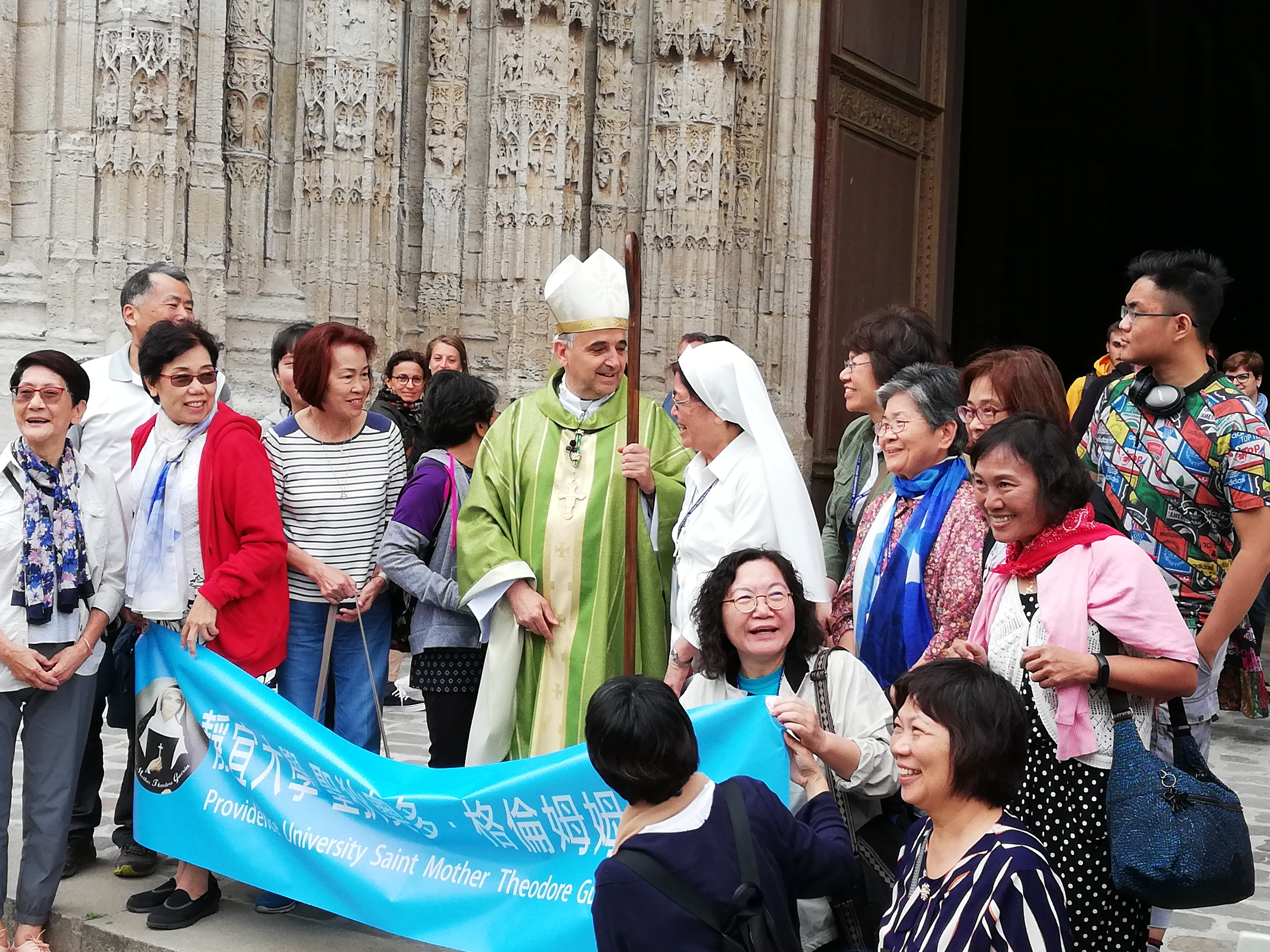 L'arcivescovo di Rouen Dominique Lebrun con Delle fedeli taiwanesi dopo una messa (agosto 2018)